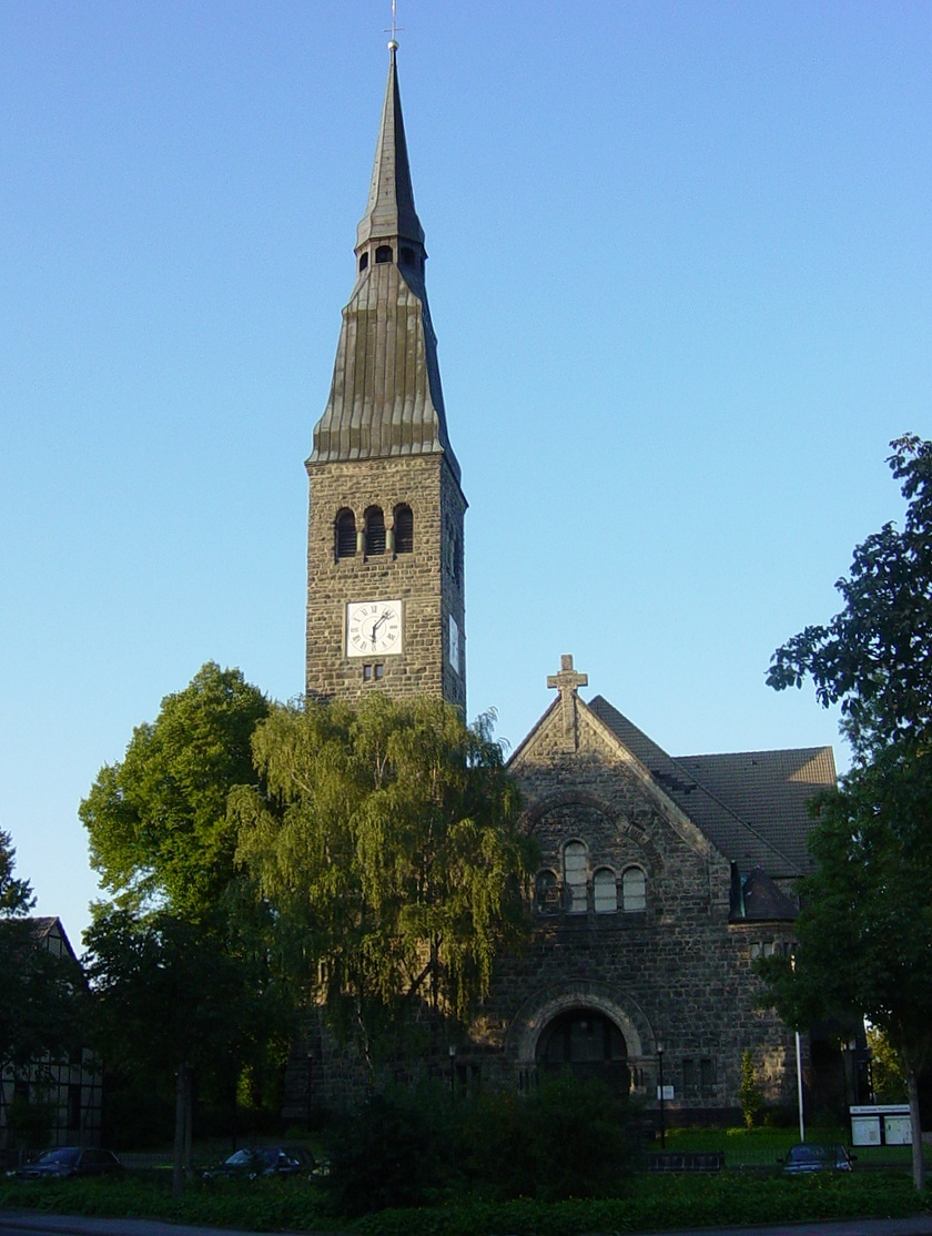 Dortmund-Marten Immanuel-Kirche